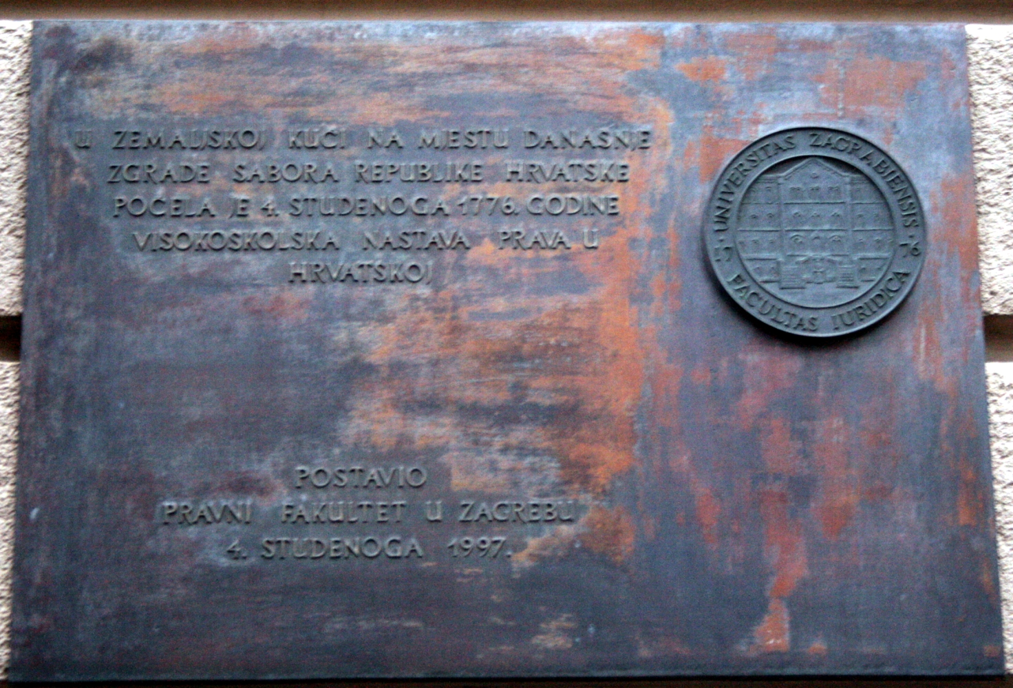 Spomen ploča Pravnog fakulteta u Zagrebu